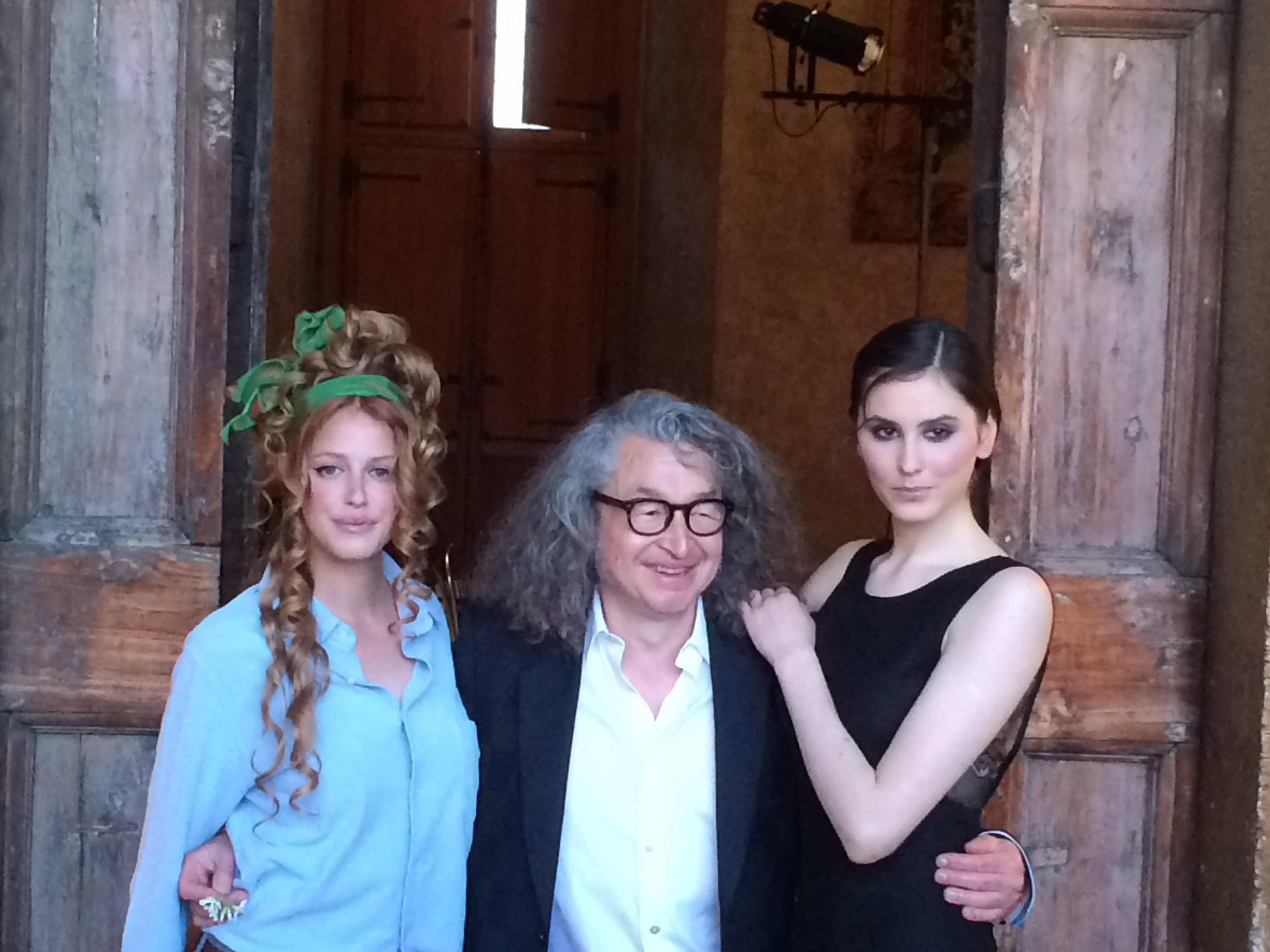 L'artiste Hervé Boudon avec des mannequins lors de son show à la Villa Médicis